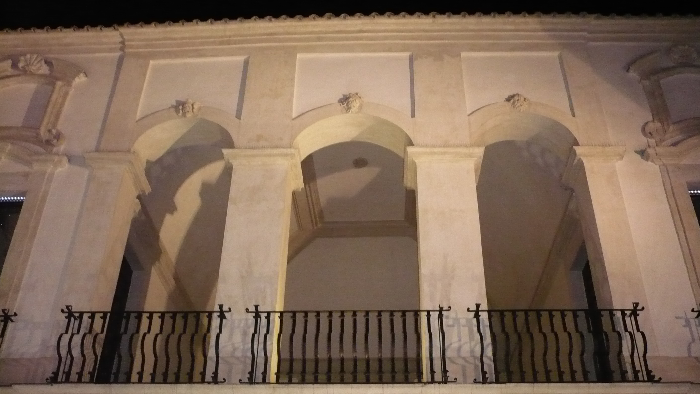 Particolare della corte di Palazzo Coccia-Cirillo di Cerignola (FG).